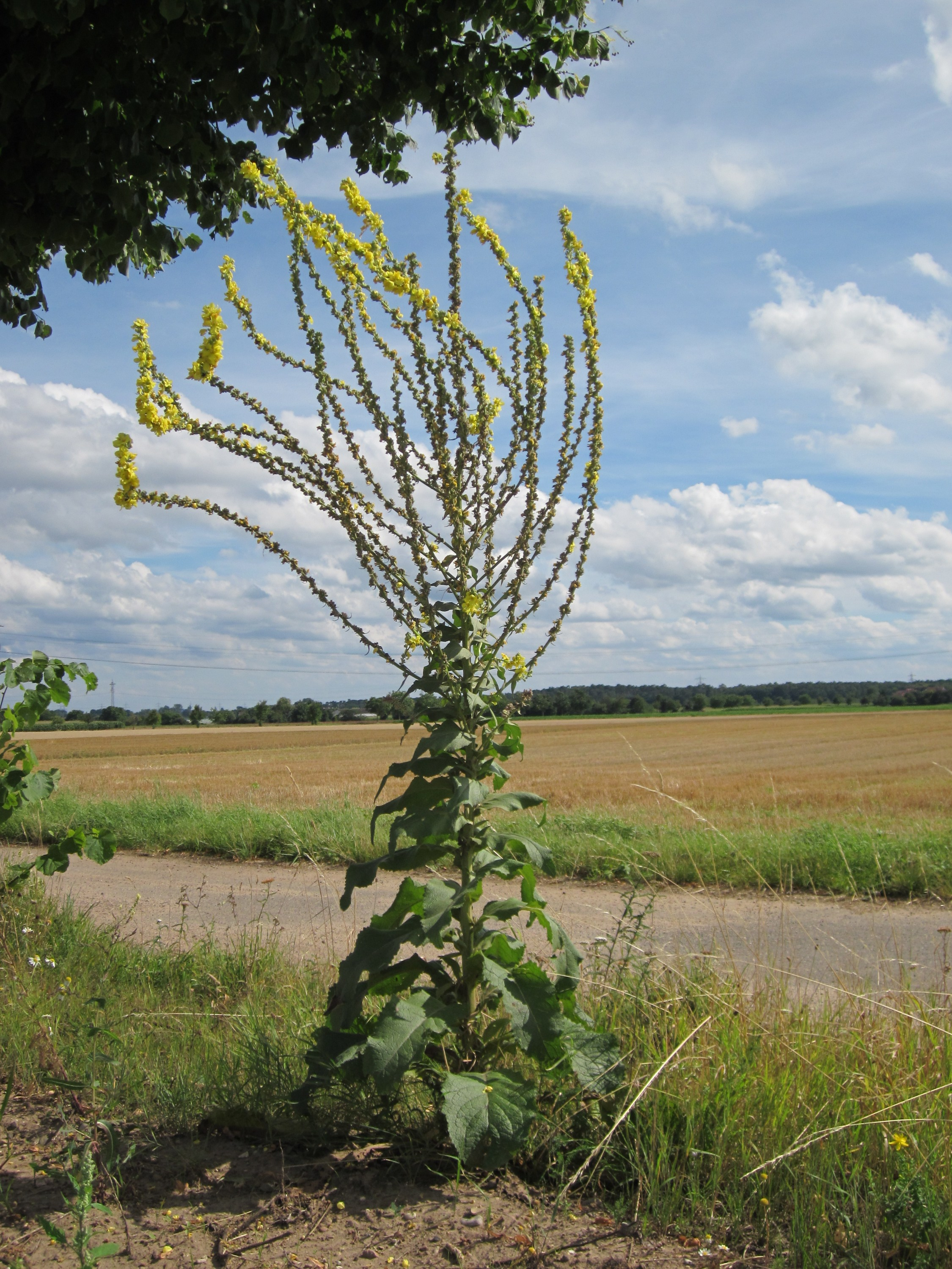 Königskerze (Verbascum thapsus) bei Oftersheim